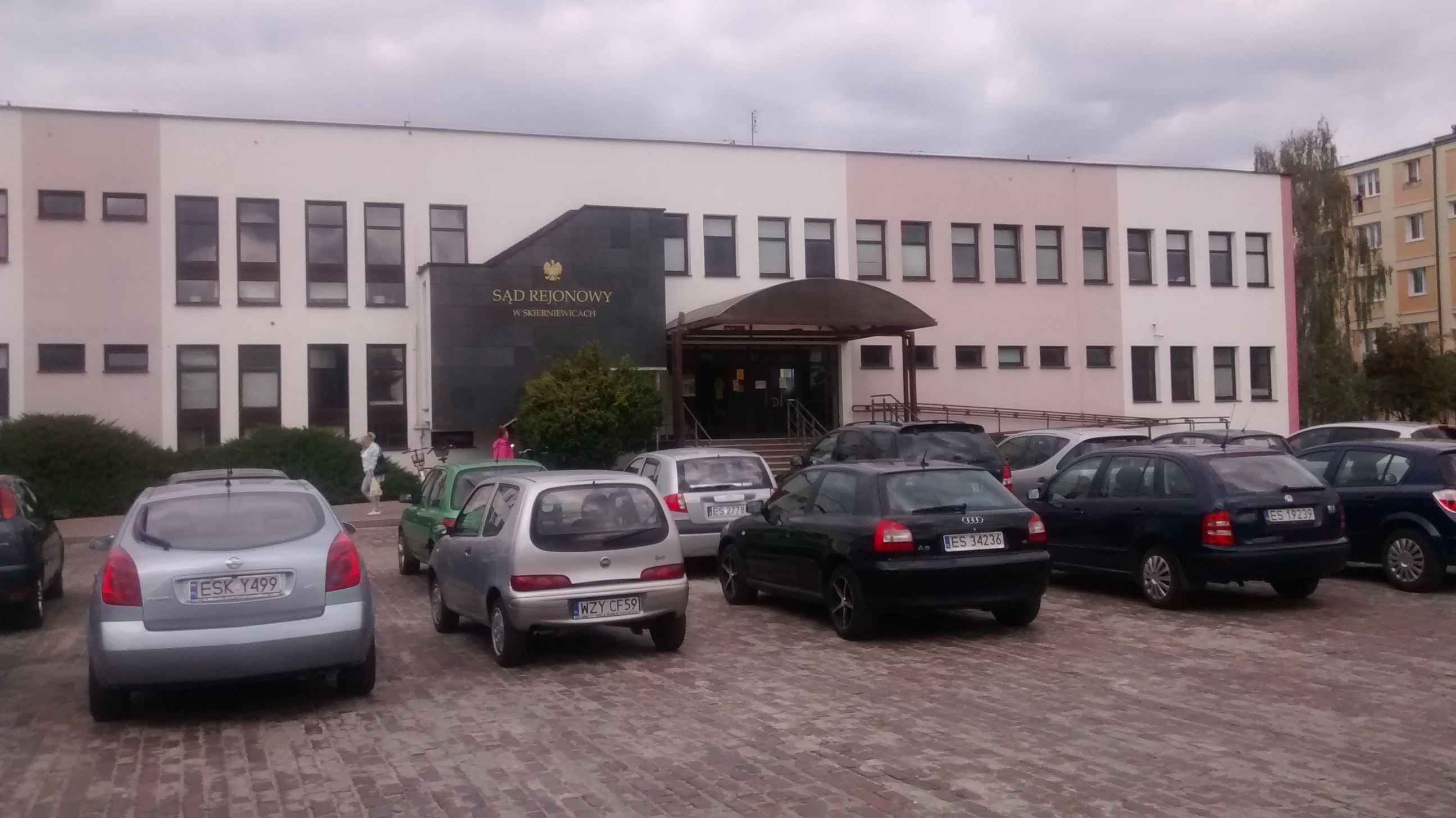 Sąd Rejonowy w Skierniewicach